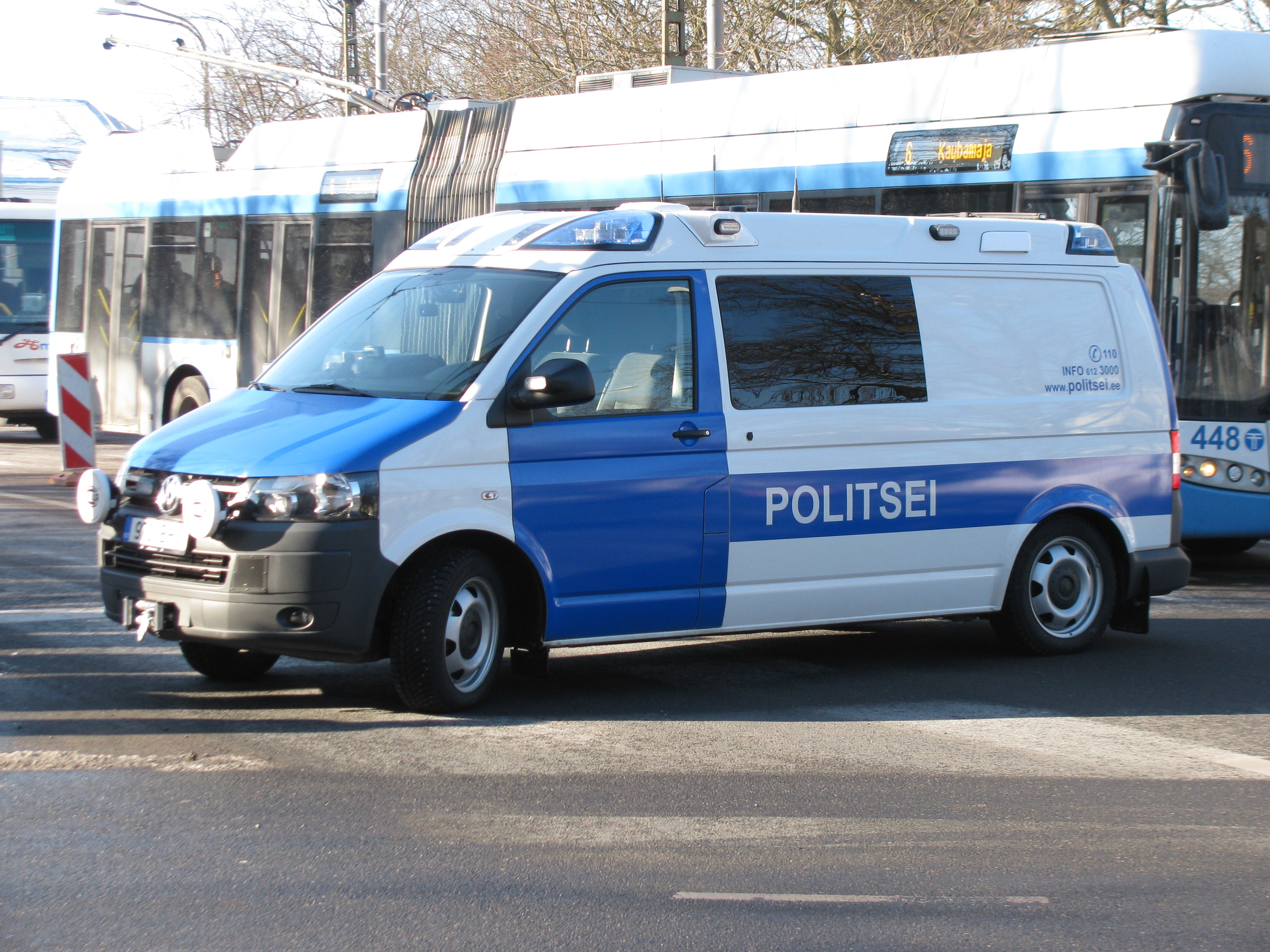 Politseiauto Tallinnas